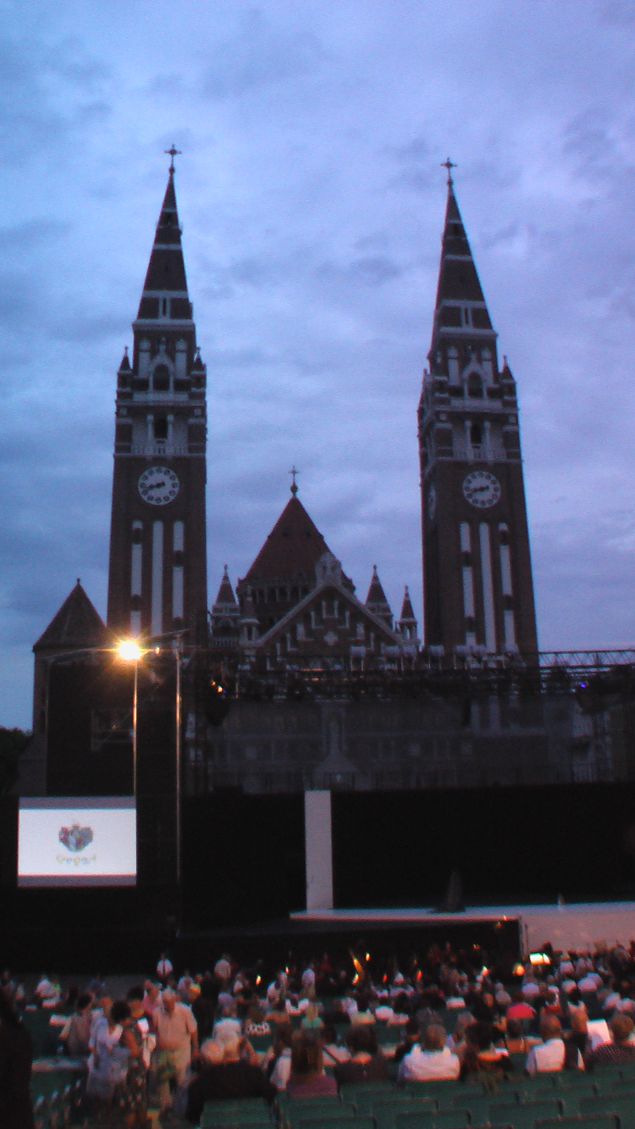 Szeged Oper Tosca 2017